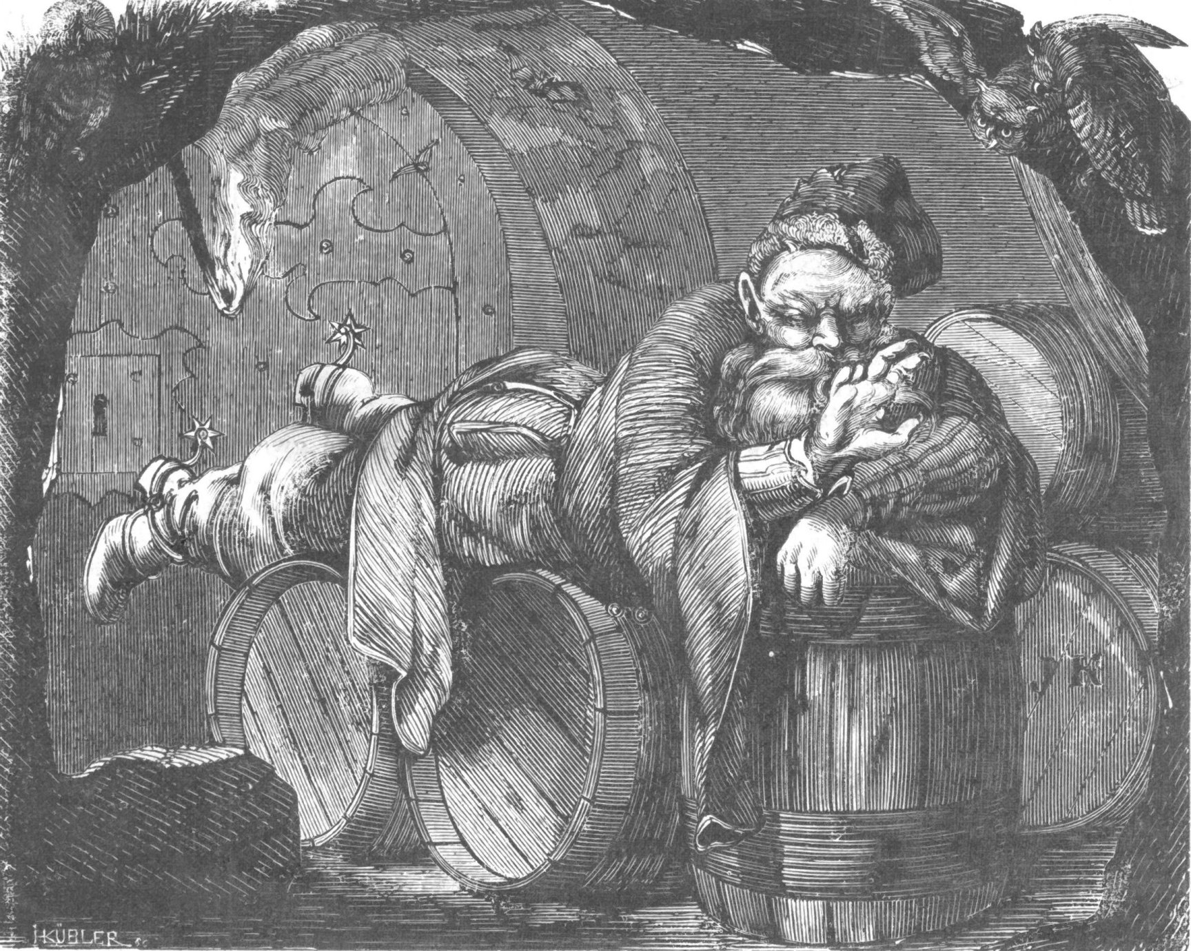 Diabeł Boruta. Drzeworyt z Tygodnika ilustrowanego wg pomysłu Juliusza Kossaka rytował H. Kubler